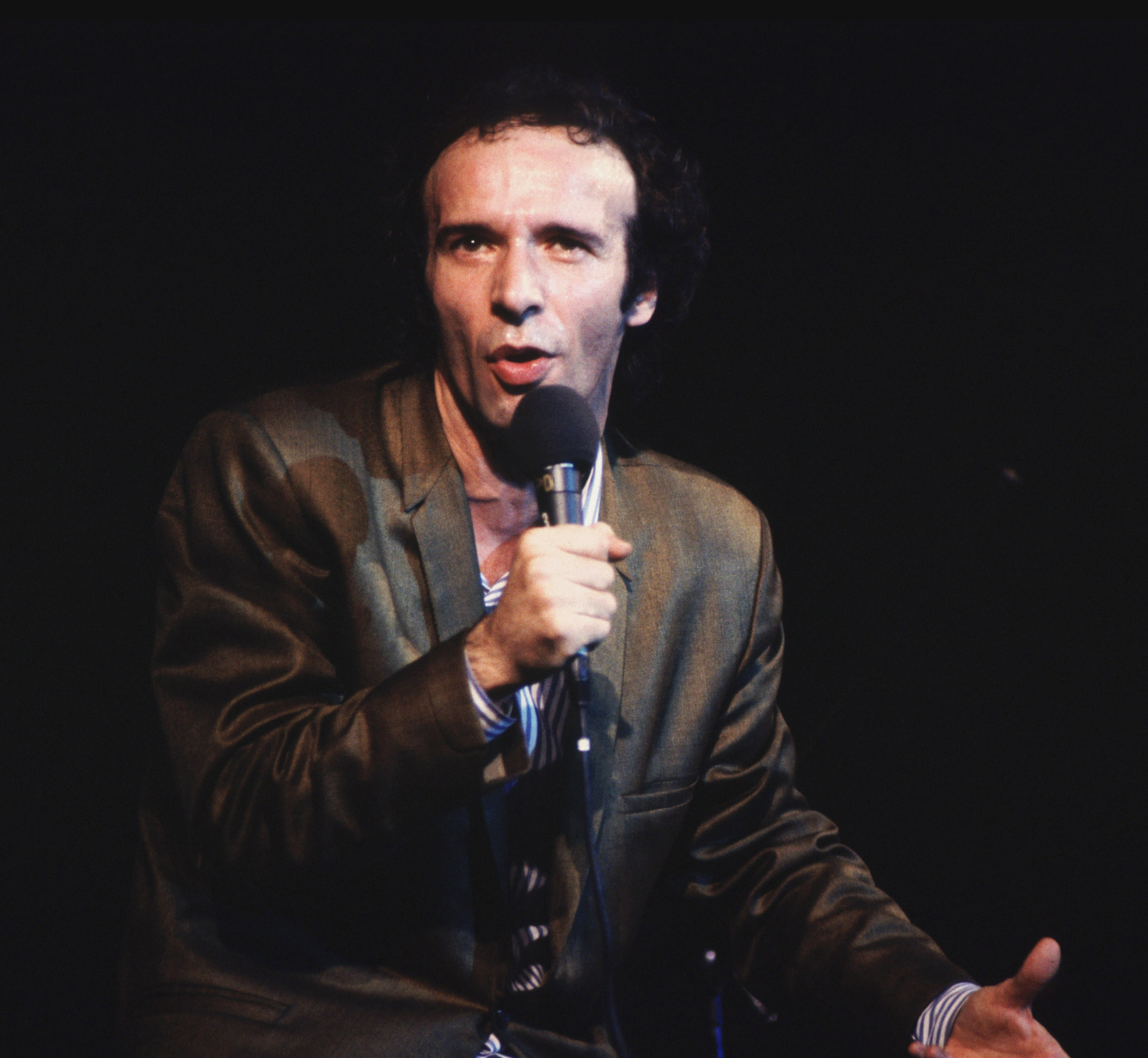 roberto benigni nel 1990